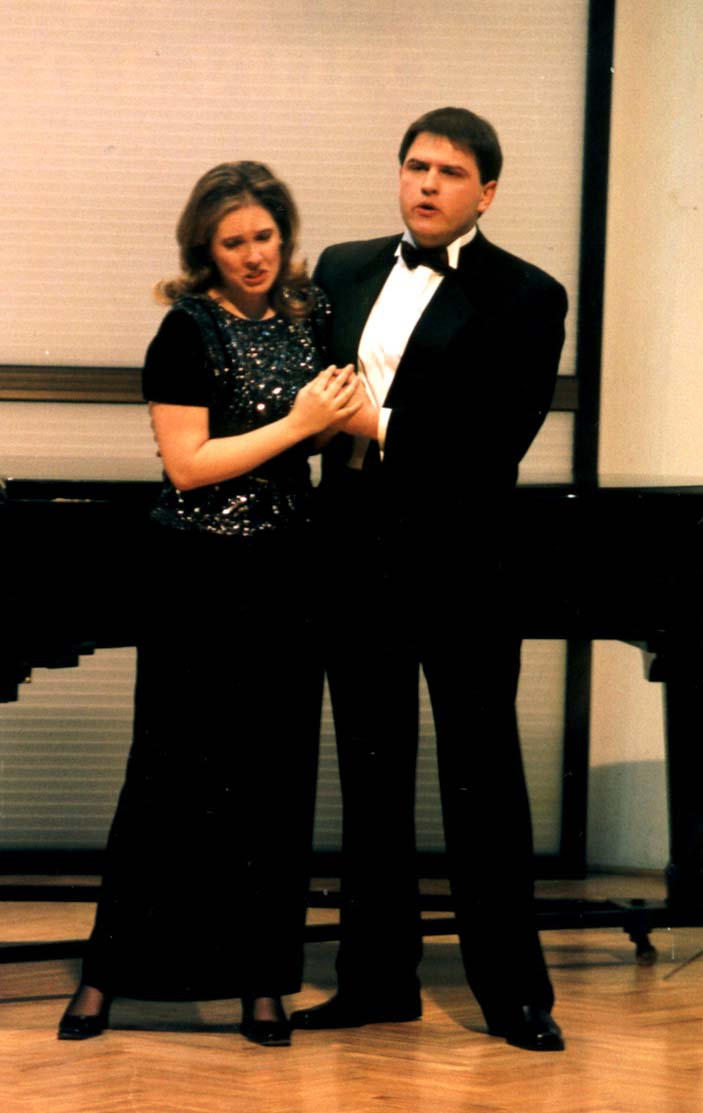 Blagoj Nacoski